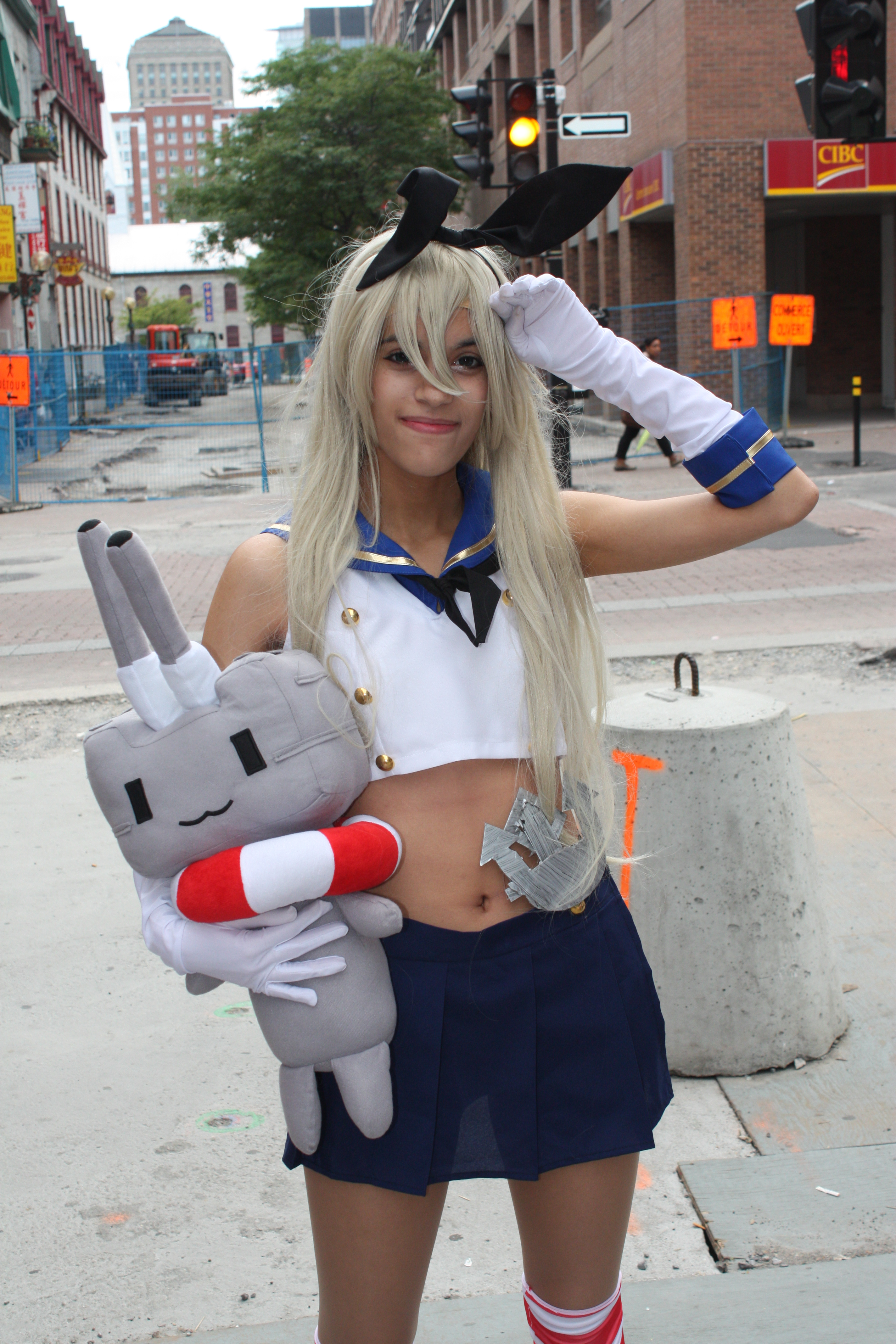 Otakuthon 2014: Shimakaze